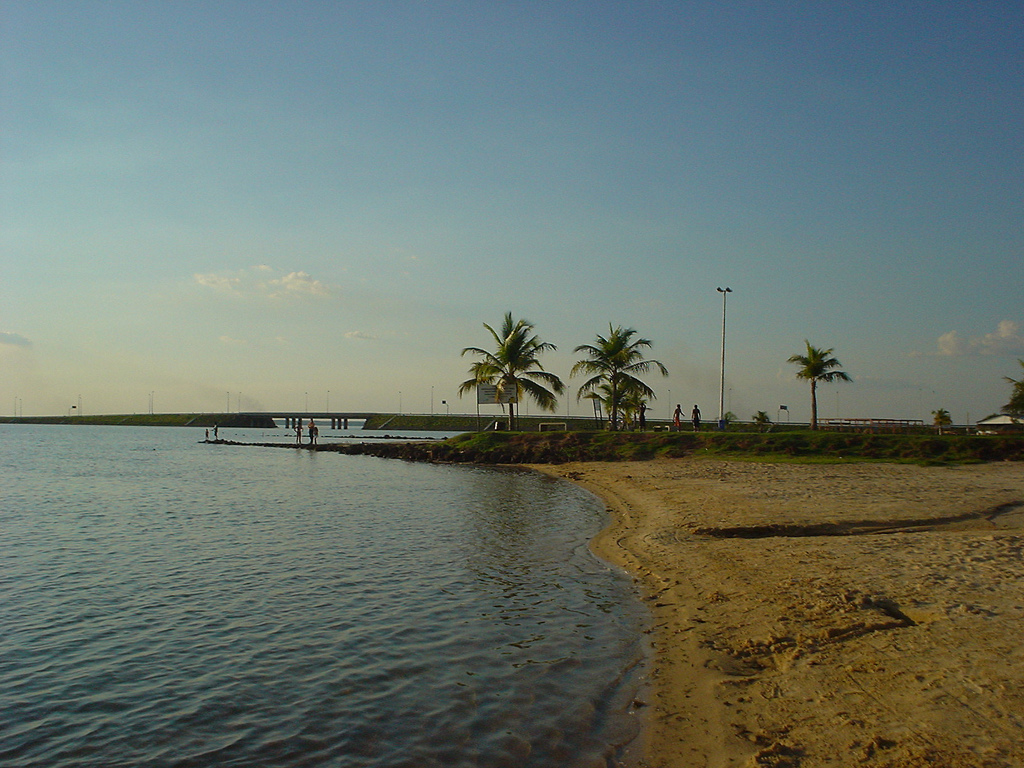 Palmas/TO/Brazil